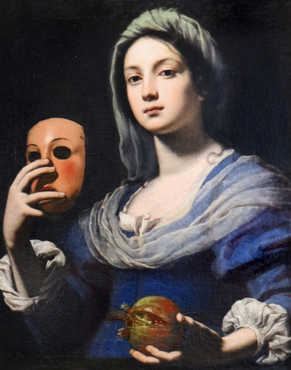 La signification de ce tableau est ambigüe car la jeune femme tient un masque de la main droite et une grenade de la main gauche. Le masque lui permet de changer son apparence et de simuler un personnage différent d'elle-même, pour séduire, pour jouer ou tromper un éventuel partenaire. La grenade est depuis la haute antiquité, un symbole de fécondité, ainsi la déesse Hera des anciens grecs est souvent représentée avec ce fruit à la main. L'association de ces deux éléments dans les mains d'une jeune femme incite à penser que l'artiste a voulu rapprocher féminité, simulation et tromperie.